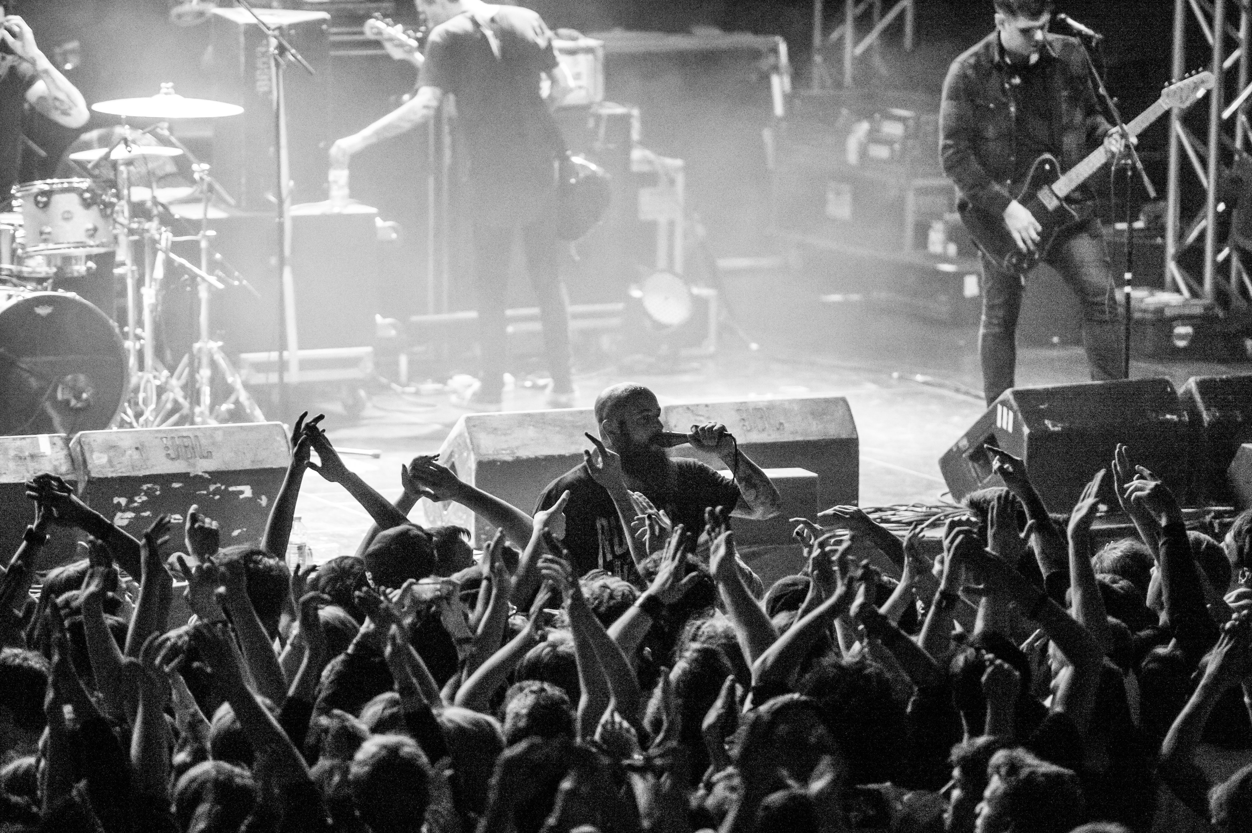 'Being As An Ocean - Impericon Never Say DIE! - Oberhausen'